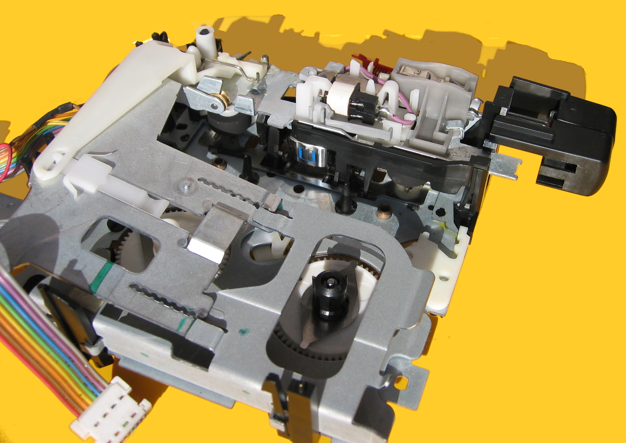 Autoreverse-Slot-In-Wiedergabelaufwerk mit 2 Tonwellen